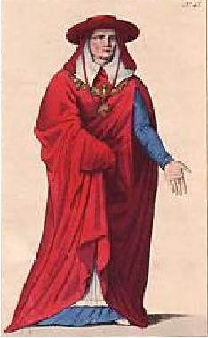 Ferry de Clugny, évêque de Tournai